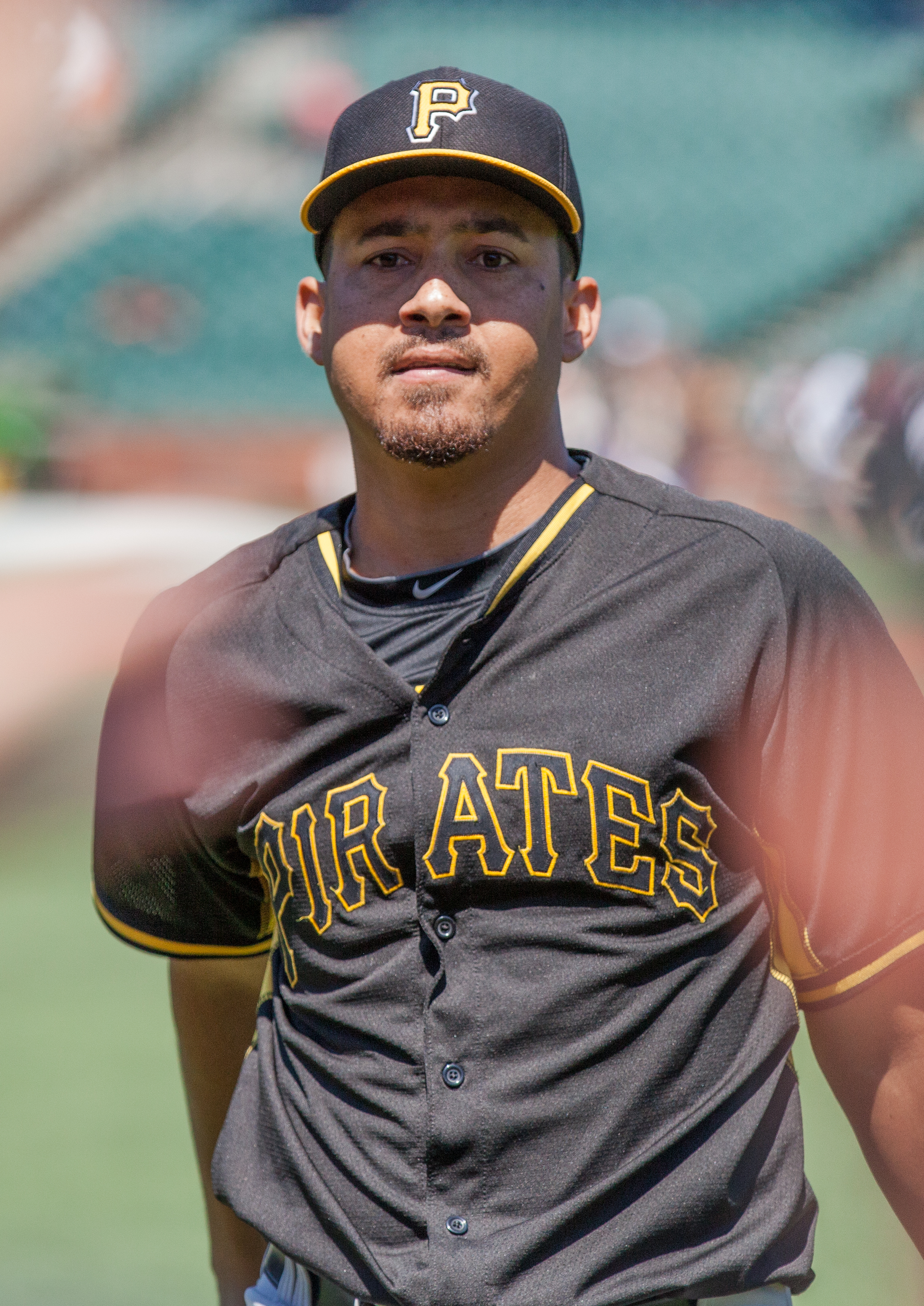 Ernesto Frieri